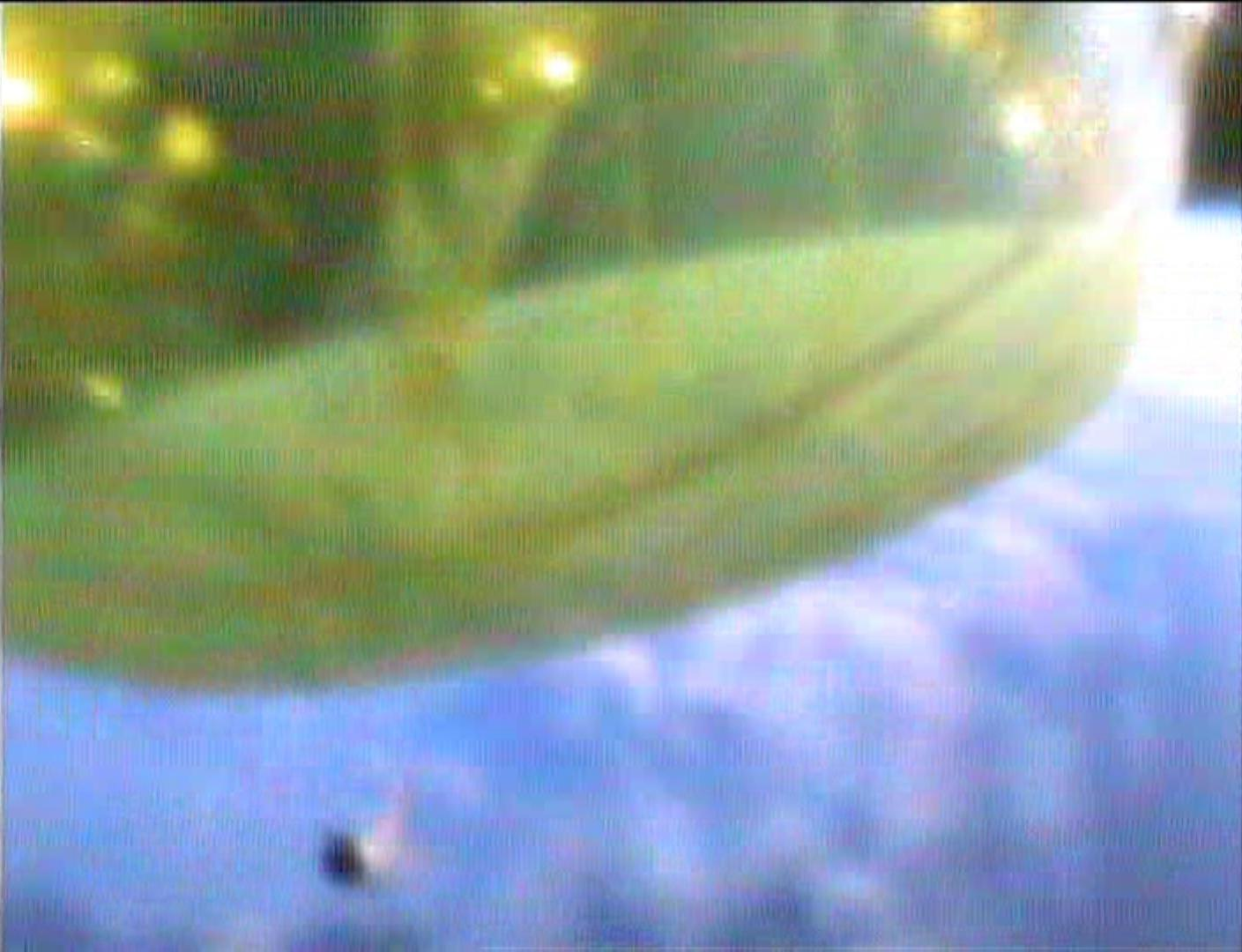 Beim Flugtest MIRIAM-1 wurde der Ballon unkontrolliert freigesetzt. Das ist das einzige verwertbare Foto der teilweise aufgeblasenen Ballonhülle. Am unteren Bildrand erkennt man die Höhenforschungsrakete.